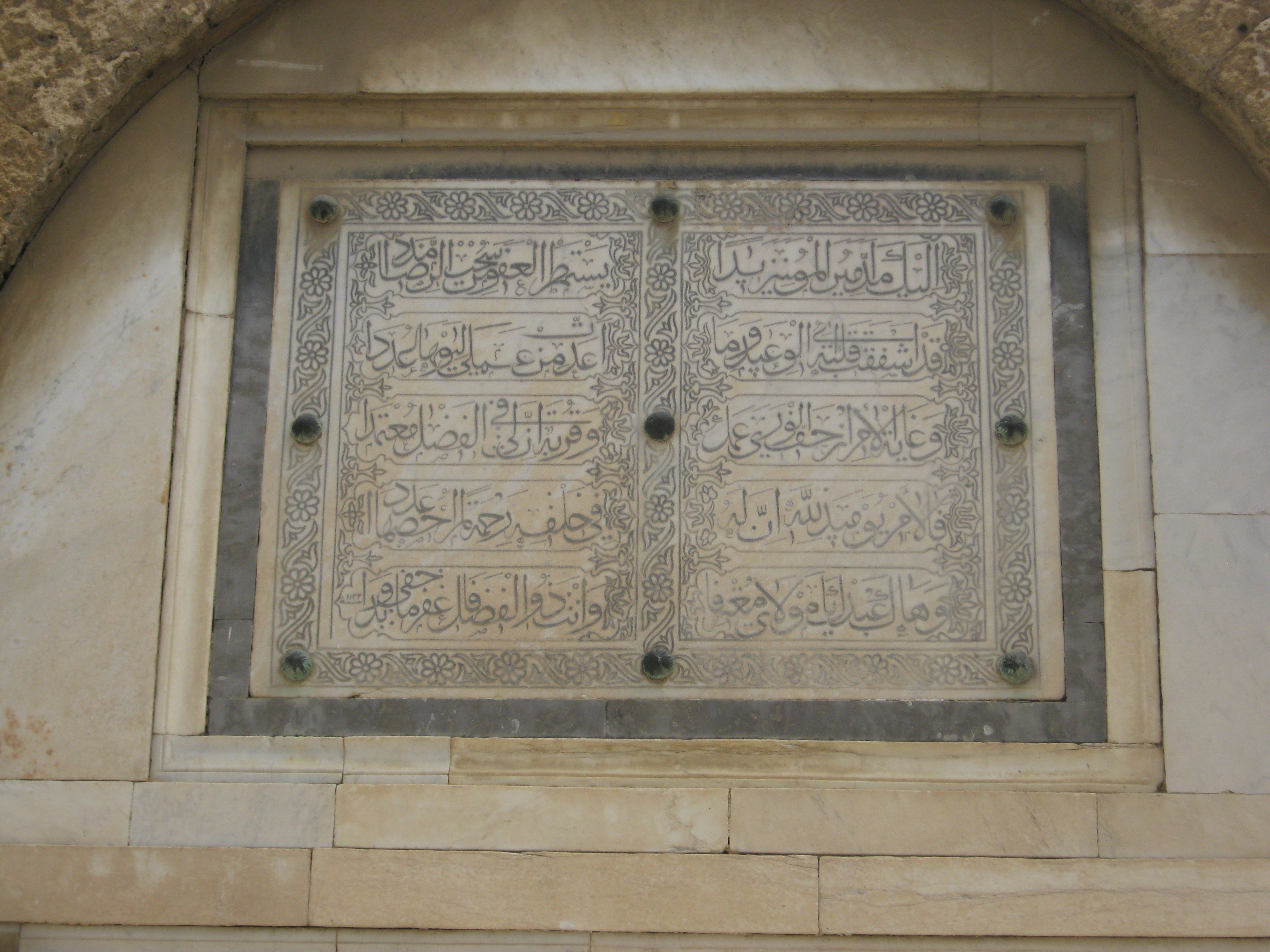 Inscription en arabe sur la façade sud de la tourba (ouest)